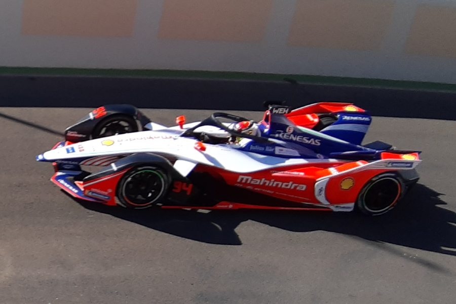 Pascal Wehrlein beim Marrakesch E-Prix 2019